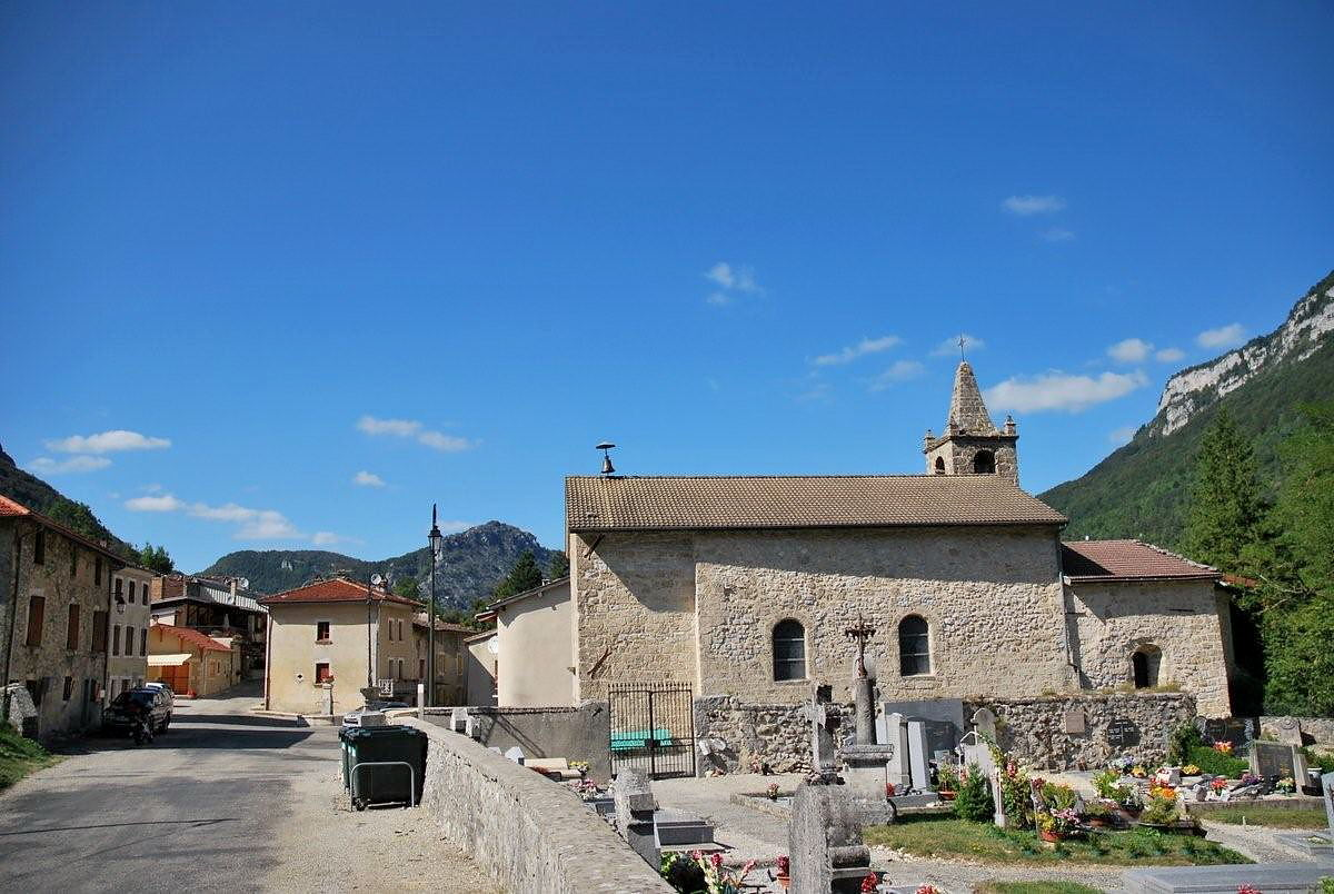 Bouvante le bas